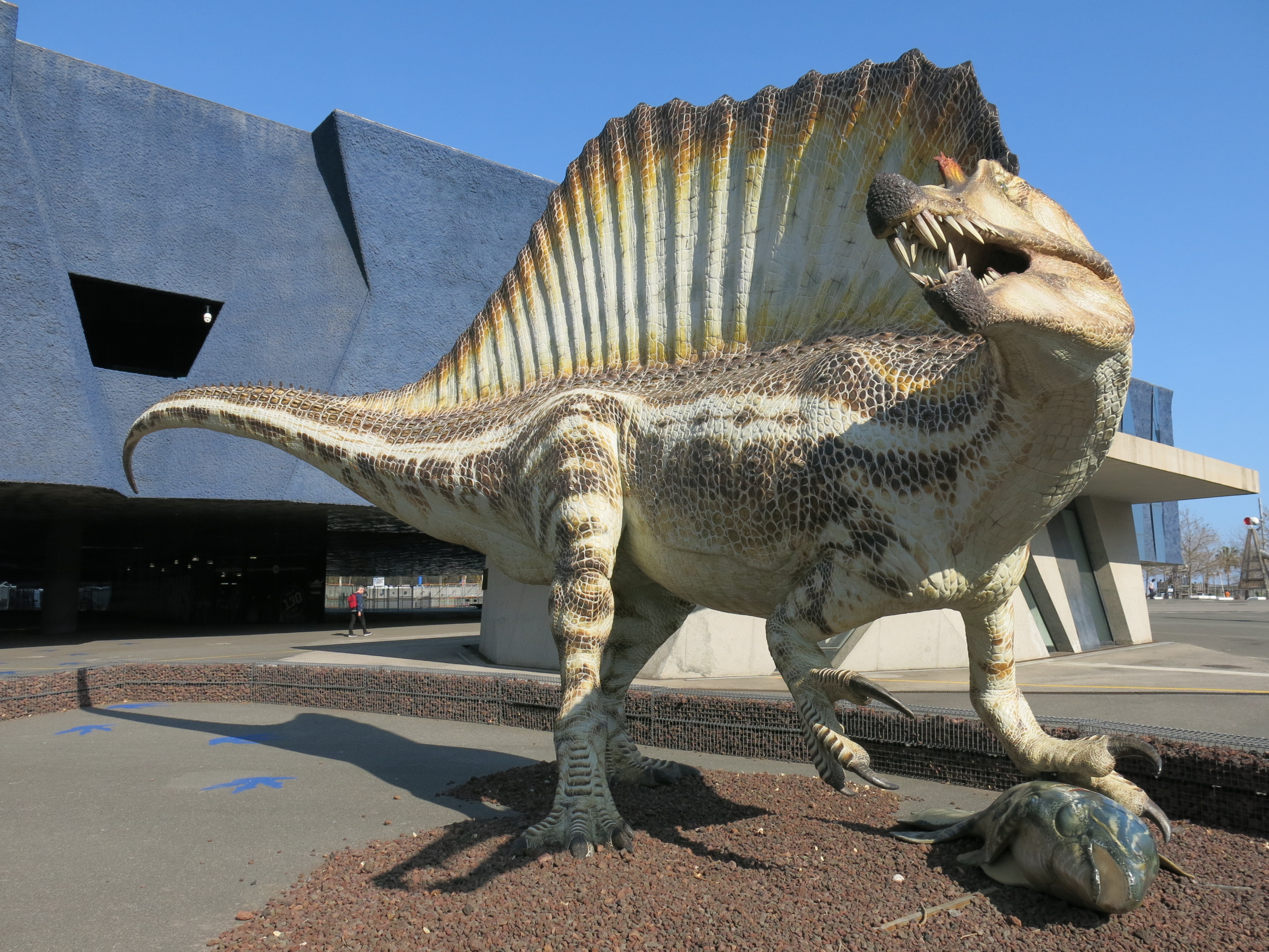 Museu Blau (Barcelona)